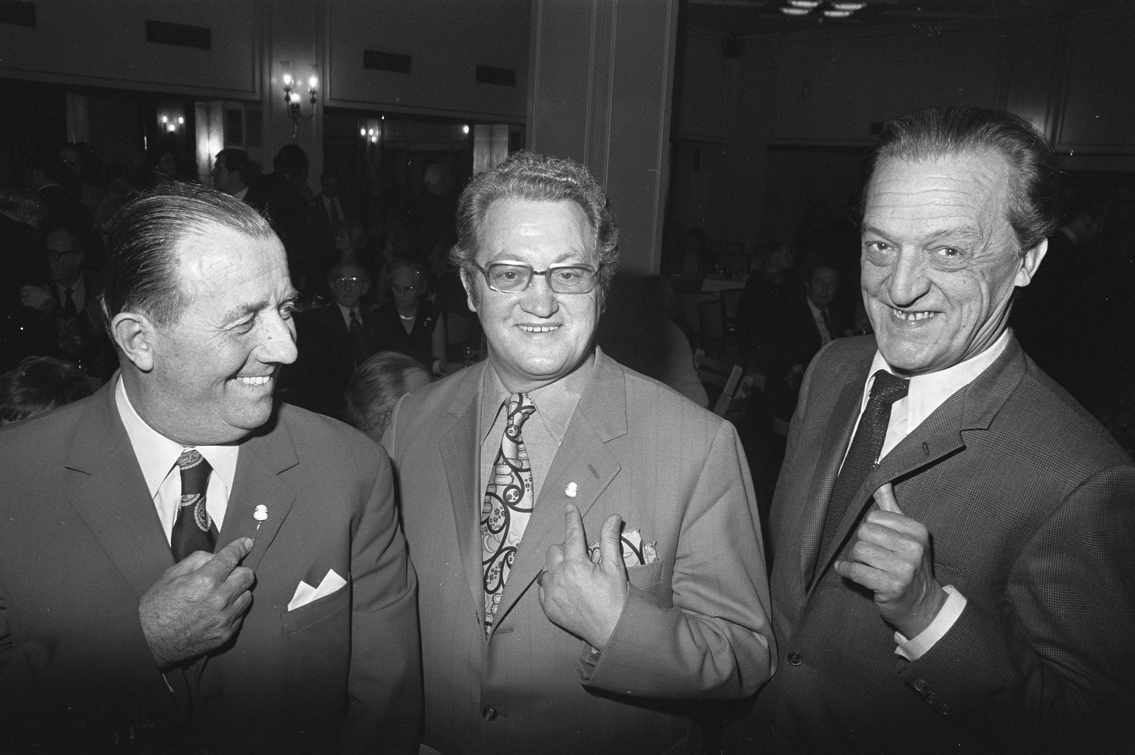 Collectie / Archief : Fotocollectie Anefo Reportage / Serie : [ onbekend ] Beschrijving : Stichting Conamus reikt gouden harpen uit, met gouden har v.l.n.r. Nico Boer , Johnny Jordaan en Cor Lemaire Datum : 13 november 1972 Trefwoorden : uitreikingen Persoonsnaam : Conamus, Johnny Jordaan, Lemaire, Cor Fotograaf : Mieremet, Rob / Anefo Auteursrechthebbende : Nationaal Archief Materiaalsoort : Negatief (zwart/wit) Nummer archiefinventaris : bekijk toegang 2.24.01.05 Bestanddeelnummer : 926-0195